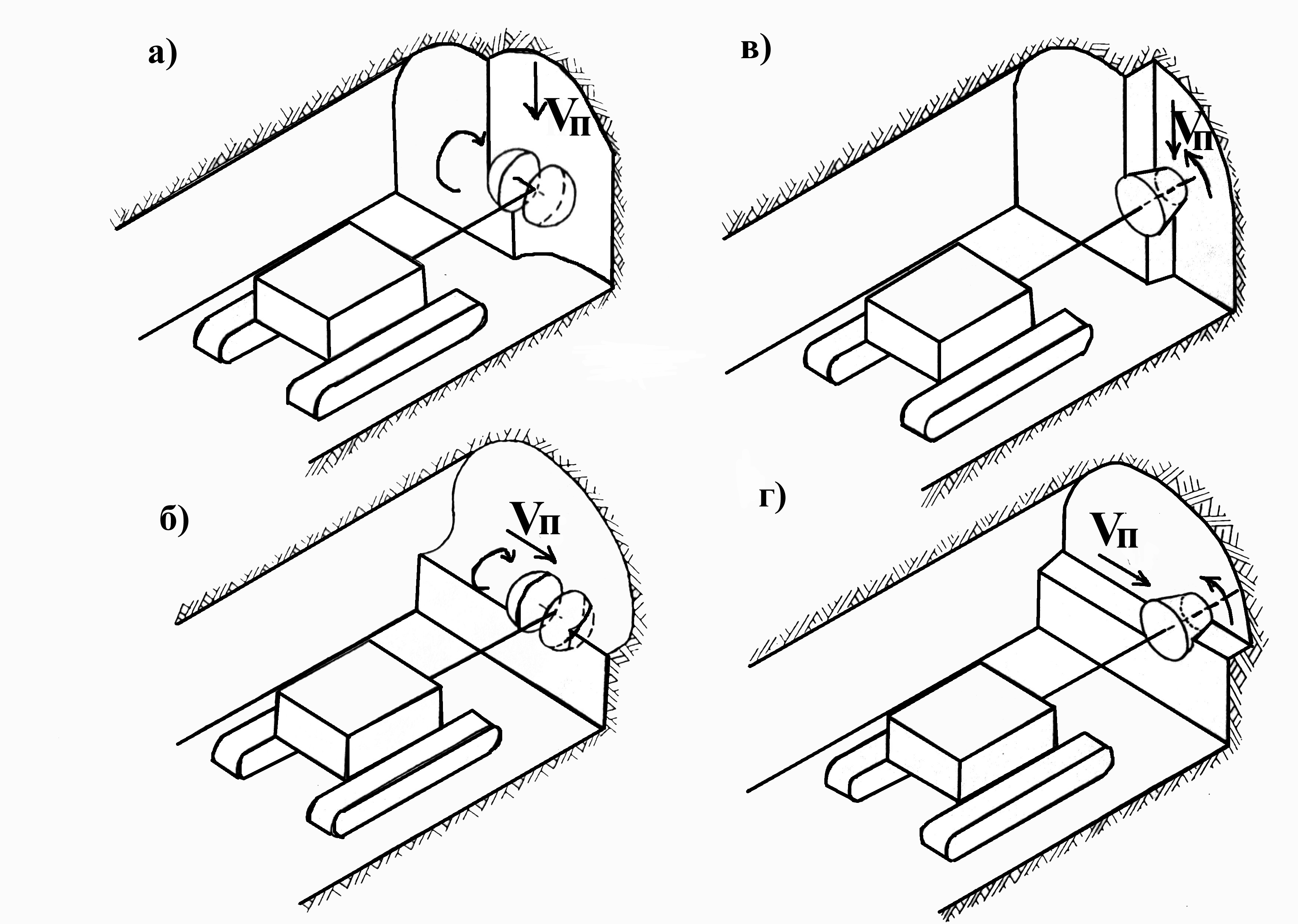 Схема